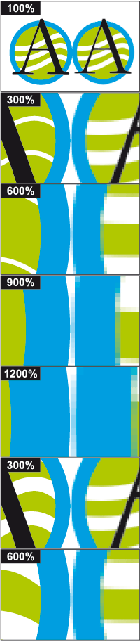 comparación entre imagen raterizada y vectorizada según zoom, own work